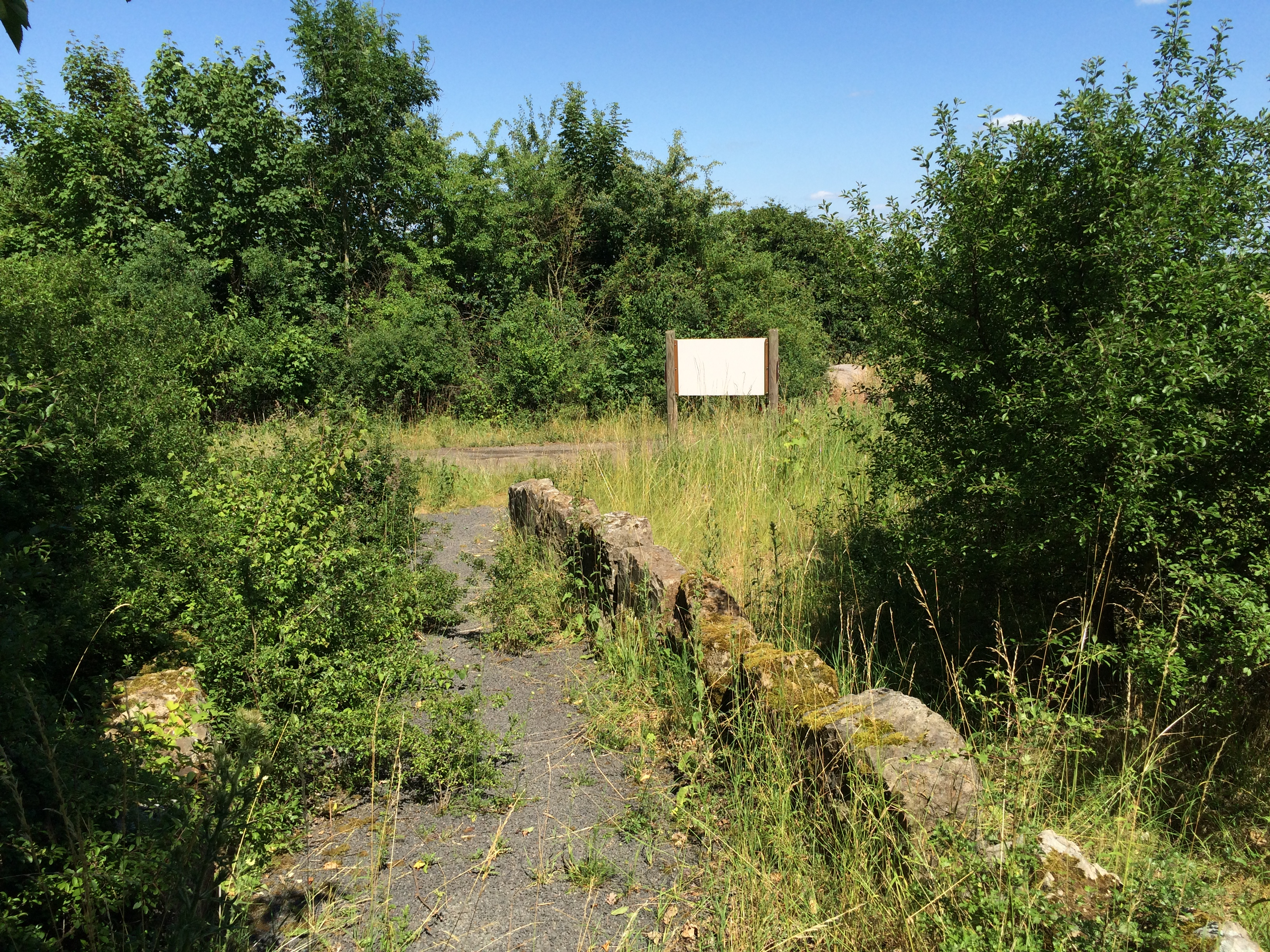 Das nachgebaute, bzw. rekonstruierte Galeriegrab II nördlich des Tiergartens und westlich von Calden; Station des Eco Pfades Archäologie Calden